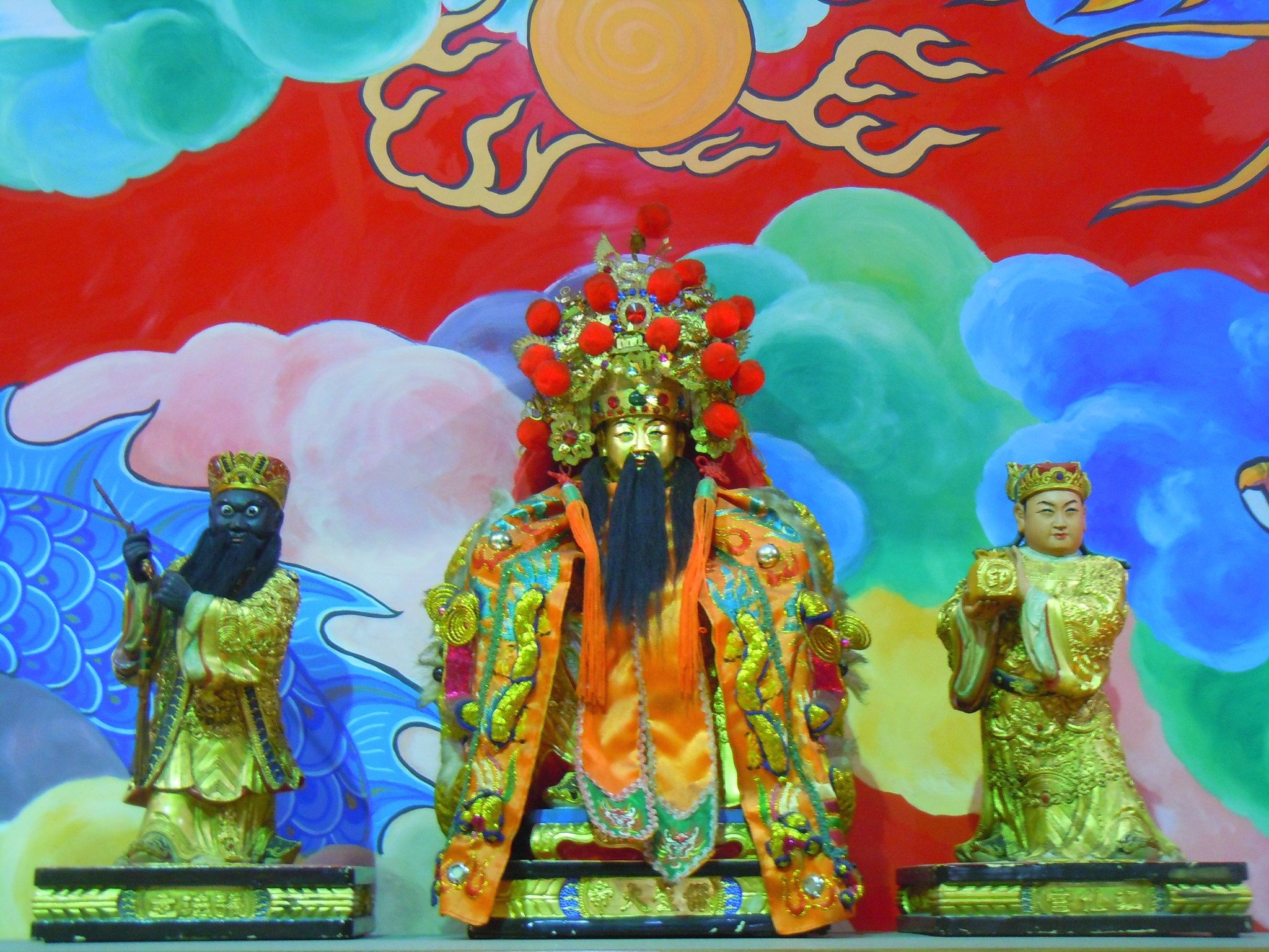 Baoshengdadi, a Chinese god. Meichuan Xi Rd., Taichung 109 - Yuan Bao Gong. 中文(繁體):臺中市北區梅川西路三段109號－元保宮。